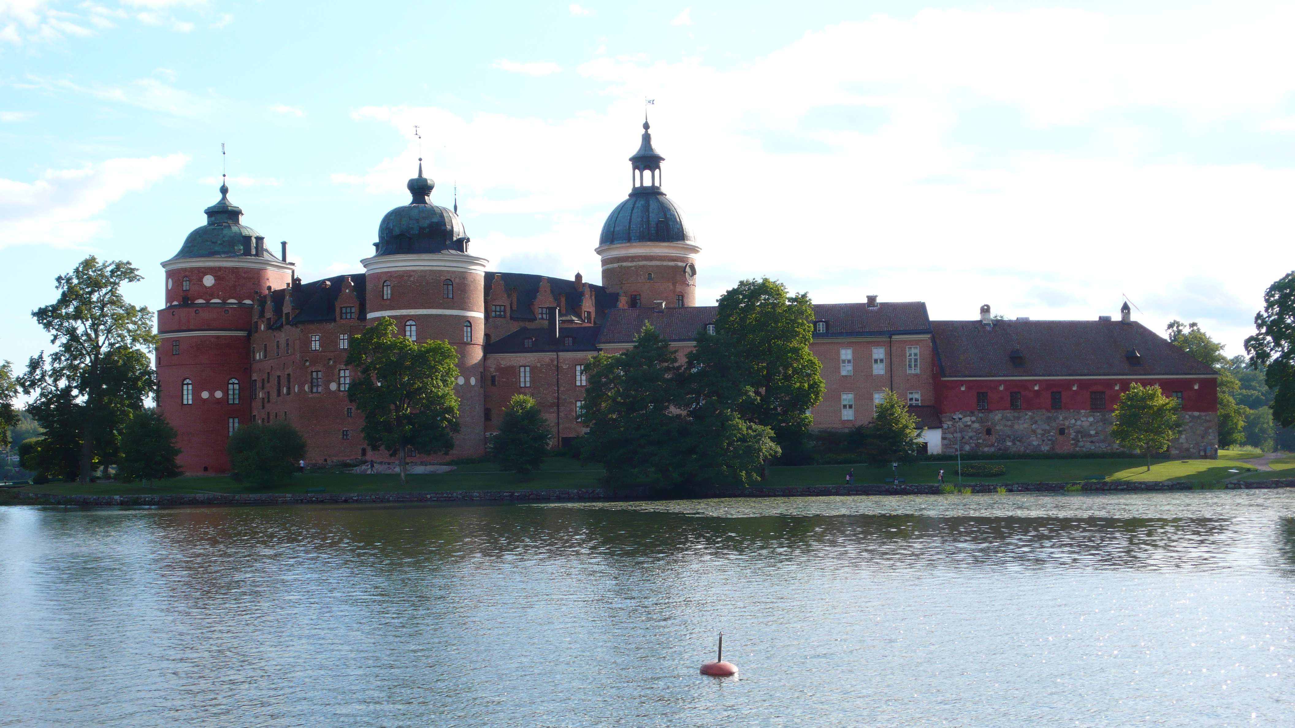 Schloss Gripsholm in Mariefred